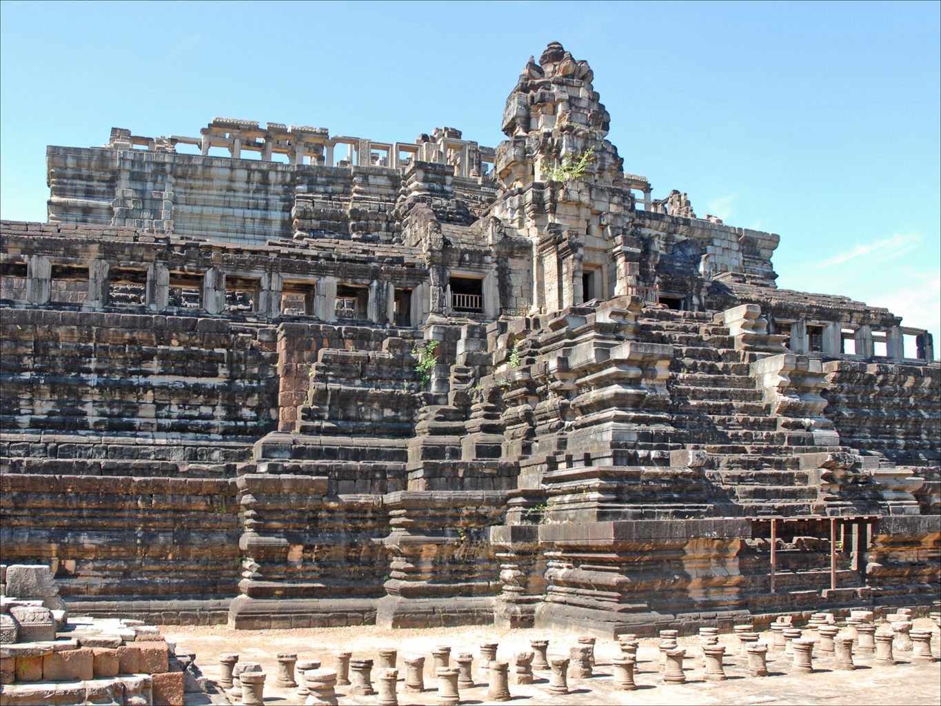 Façade est du Baphuon Temple-montagne shivaïte de 3 étages datant du milieu du XIè siècle construit en grès sous le règne de Udayâdityavarman II Au XVIè siècle, le temple a servi de carrière pour ériger un grand Bouddha couché sur la façade ouest. L'EFEO a commencé la restauration de ce temple en 1960 et l'a achevée en 2011, avec une interruption entre 1970 et 1992 en raison de la guerre. Les difficultés rencontrées ont été innombrables : effondrements, invasion par la végétation, destructions des archives du chantier par les khmers rouges, instabilité du soubassement, déformations des murs et infiltrations d'eau, modifications au cours du temps, Le renforcement des soubassements a du être effectué au moyen de voiles de béton armé placés à l'arrière des maçonneries et invisibles à l'oeil. Pour y parvenir, toutes les façades ont été déposées. Article de Wikipedia sur le Baphuon Article de l'EFEO